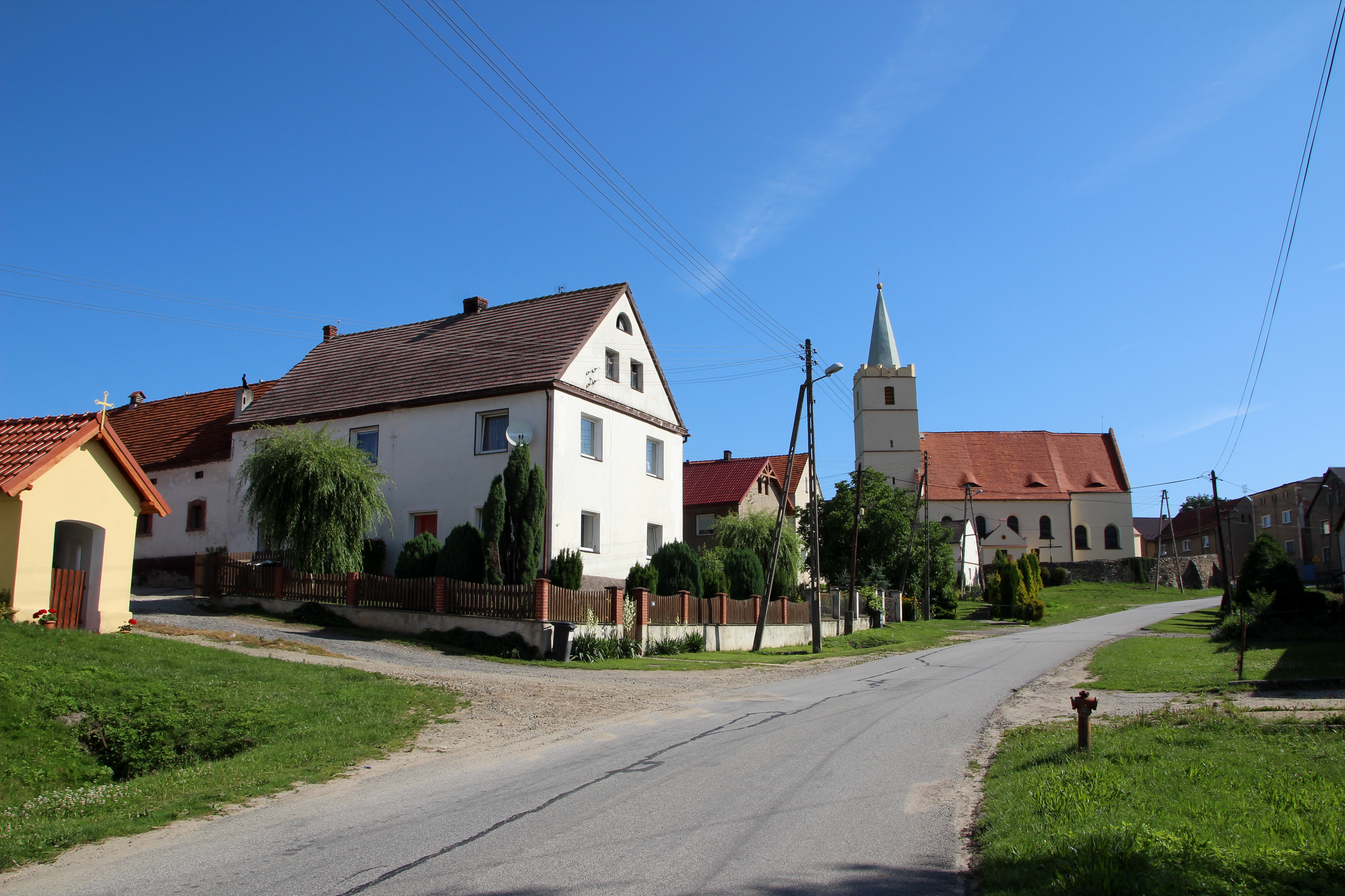 Wierzbięcice - wieś w Polsce w opolskim, w powiecie nyskim, w gminie Nysa.